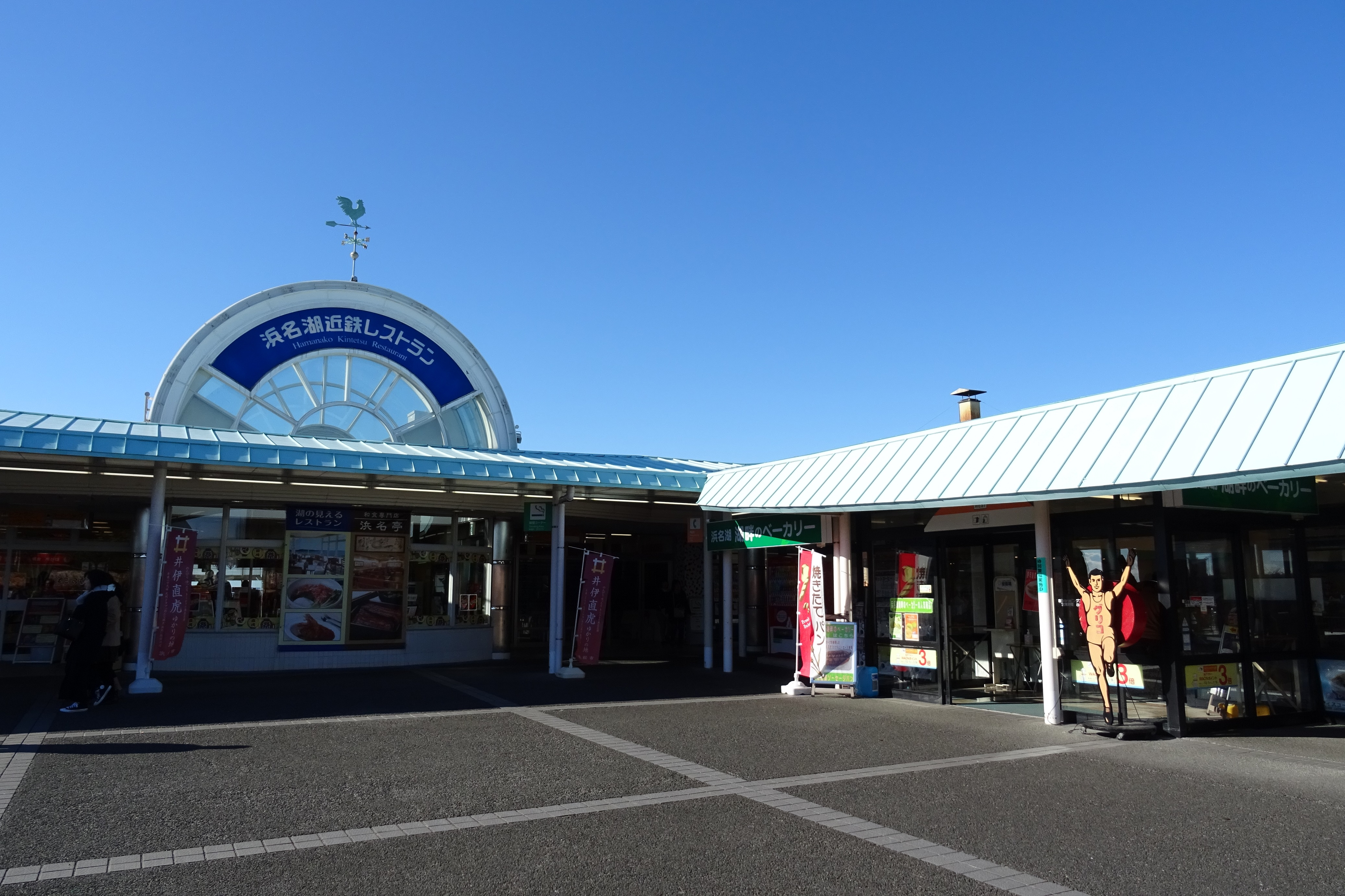 浜名湖サービスエリア西館